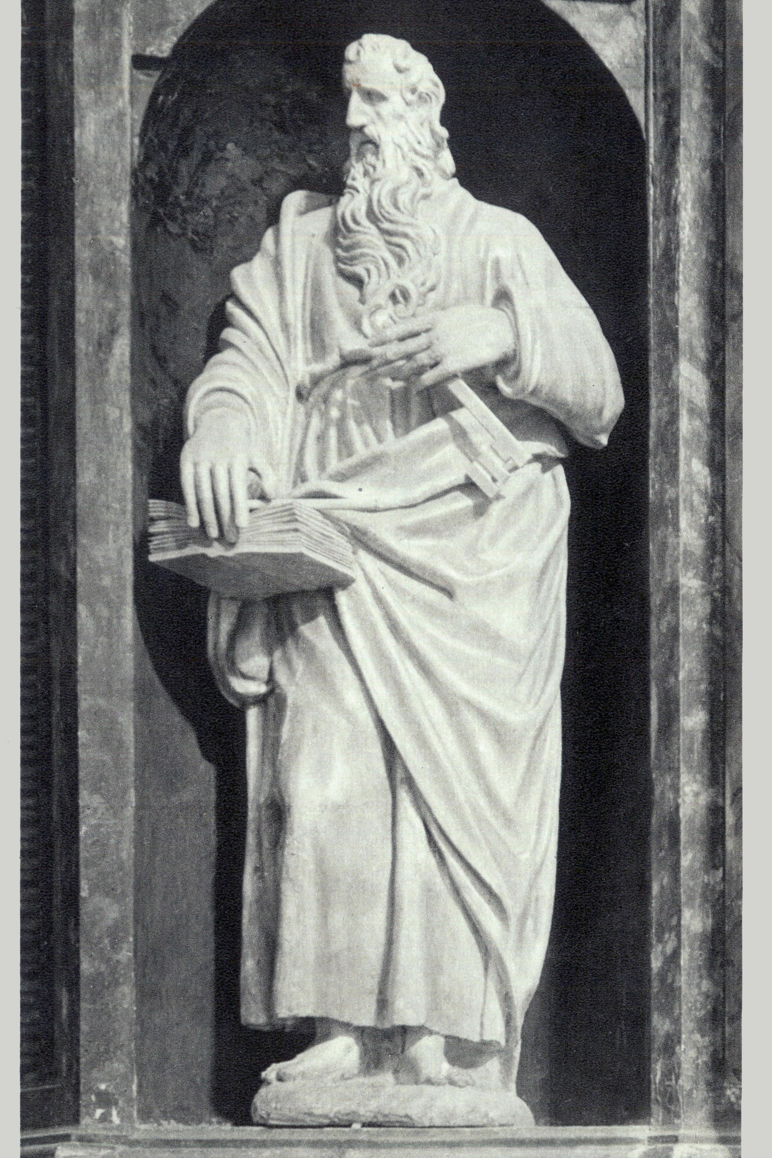 Situado en el nicho inferior derecho del Retablo principal.